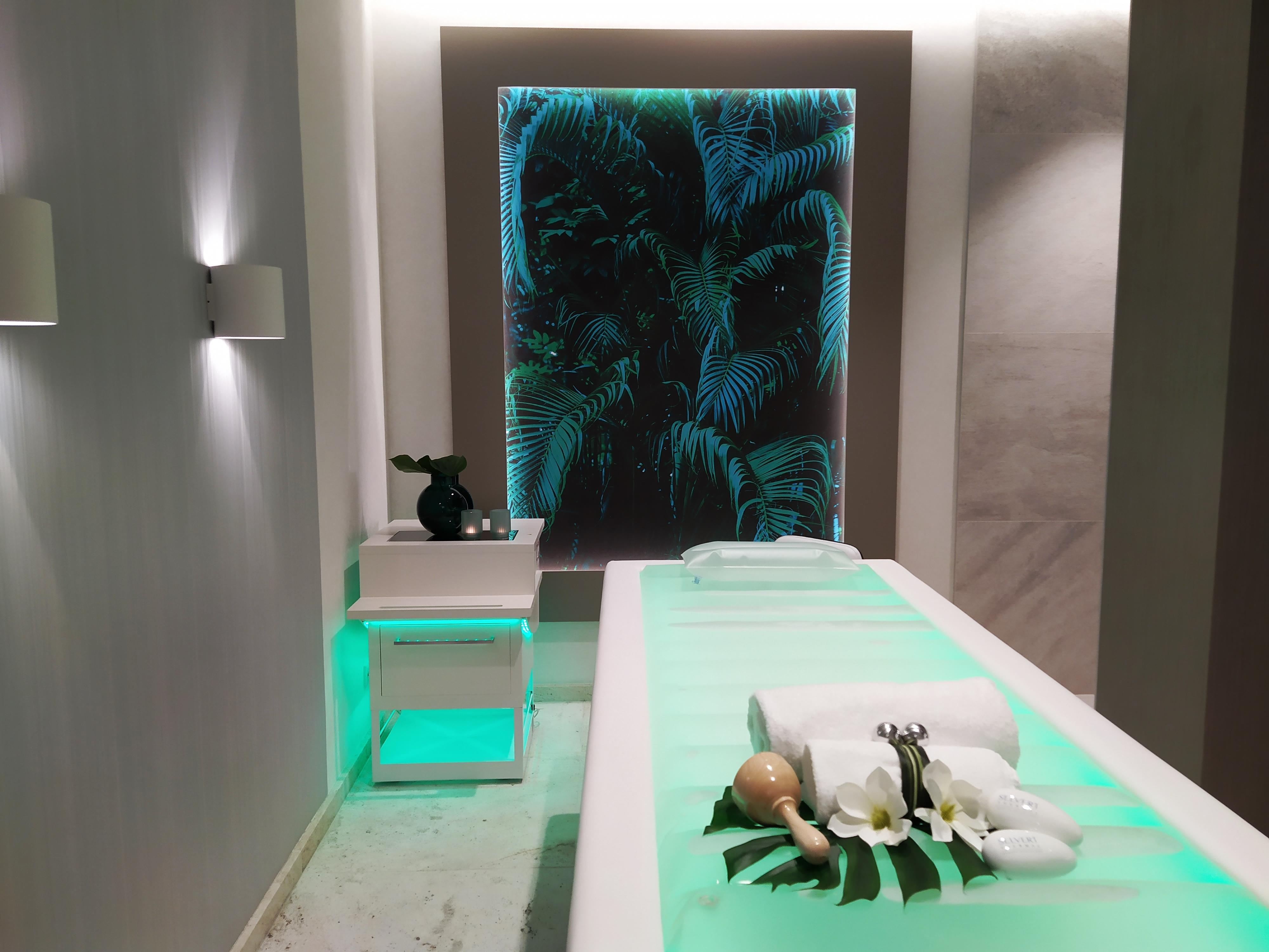 Suntago Wodny Świat - salon spa, łóżko wodne